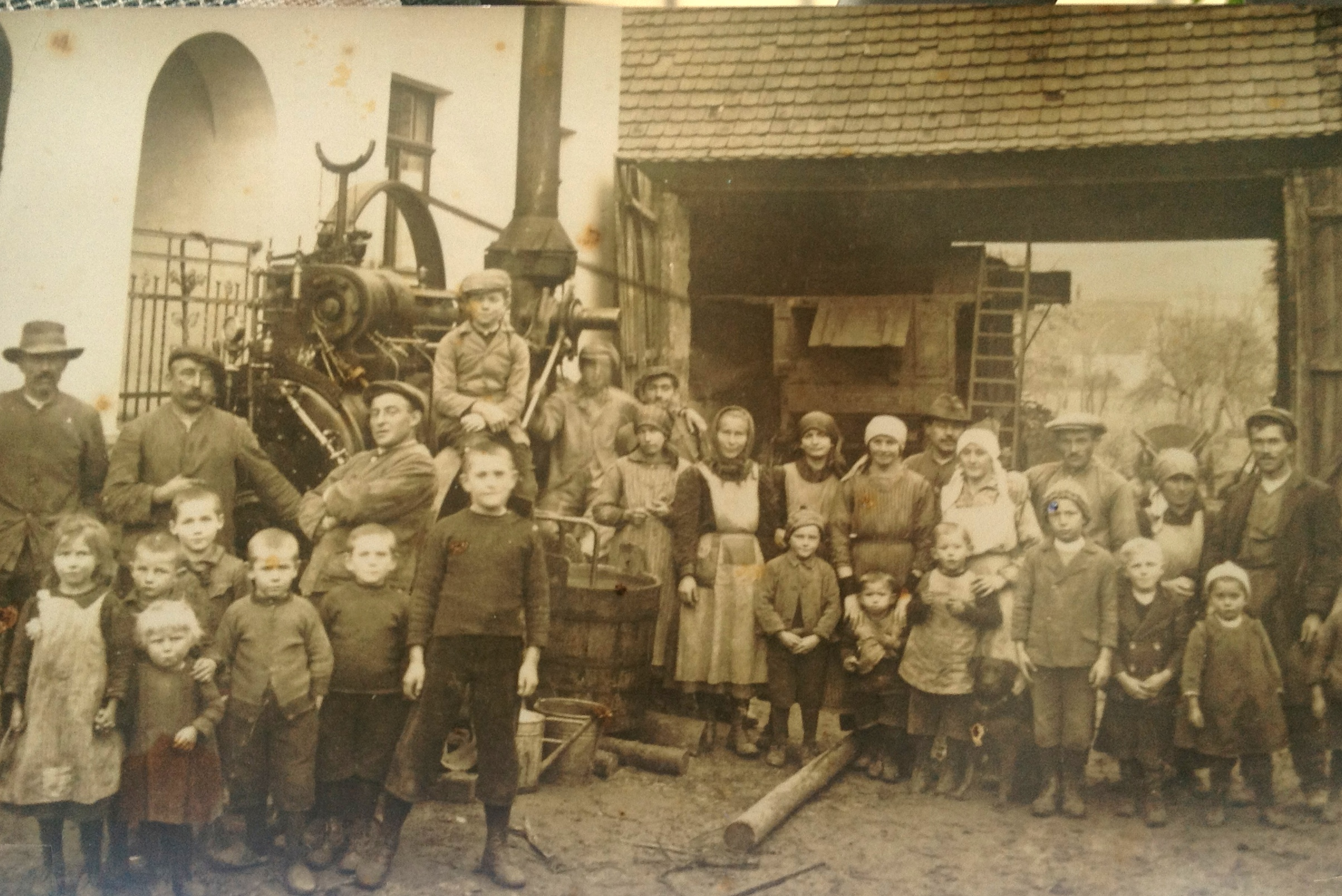 in Heuchelheim